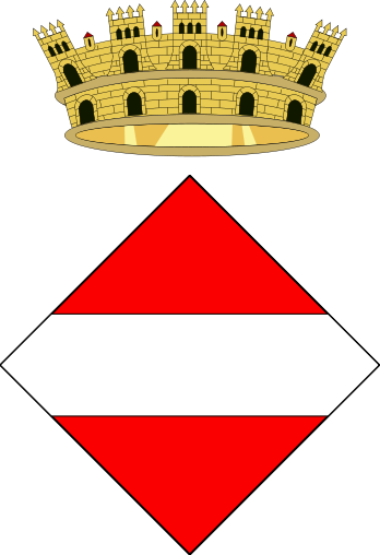 Escut de Valls